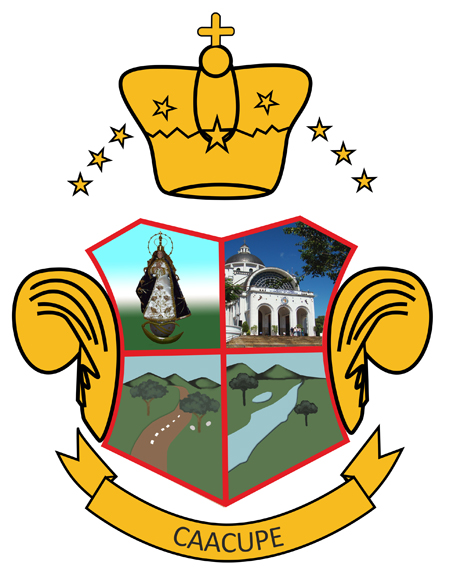 La corona de la VIRGEN MARIA simboliza "el reino de Maria", las estrellas, el firmamento de Dios, el blasón constituye las plumas de los indios cristianos guaraníes, en la izquierda superior, la imagen de Nuestra Señora de los Milagros de Caacupé, la derecha superior la Basílica de Caacupé, inaugurado en abril de 1988 por el Papa Juan Pablo Segundo, izquierda inferior, los cerros que rodean la ciudad y en la derecha inferior los arroyos que cruzan la ciudad.